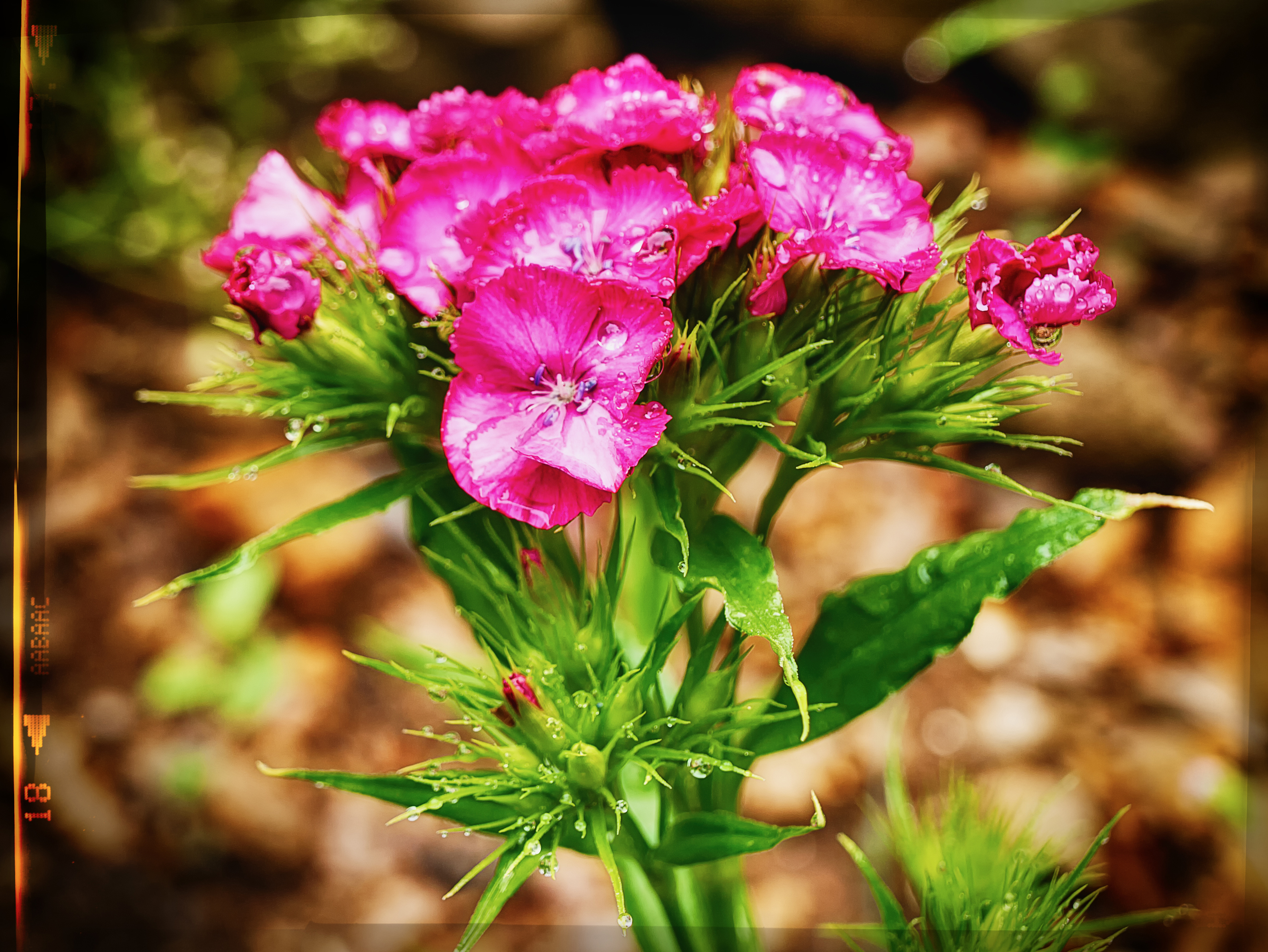 Diánthus barbátus